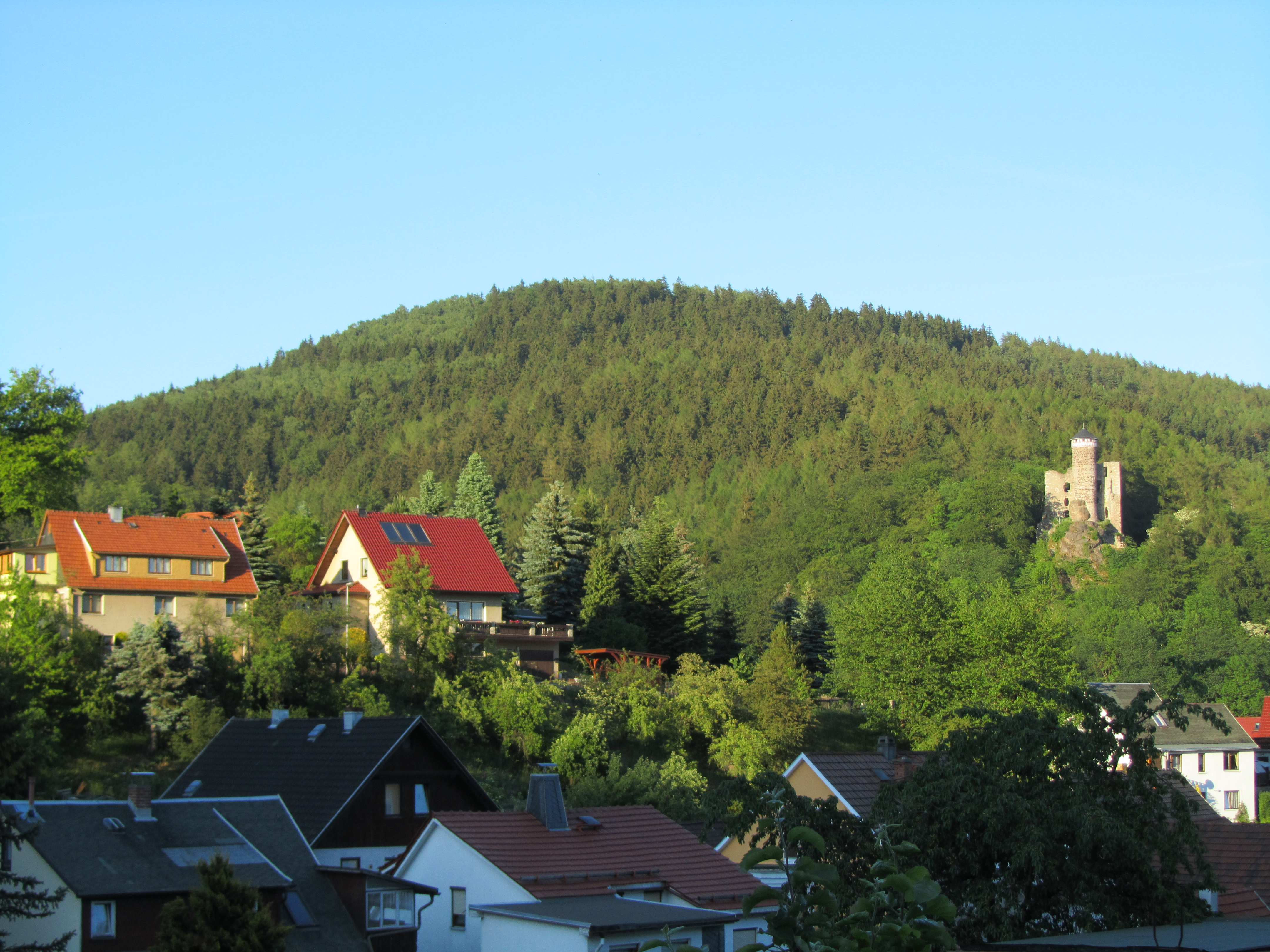 Der Arnsberg (684,5 m) über Steinbach-Hallenberg in Thüringen. Rechts im Wald die Ruine Hallenburg